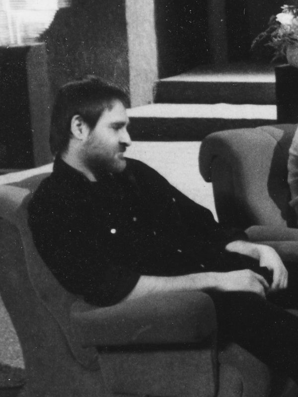 Tarr Béla rendező. Location: Hungary, Budapest Tags: Hungarian TV Title: Tarr Béla rendező, Kóthy Judit szerkesztő-riporter, Szinetár Miklós osztályfőnök, Deák Krisztina, Moldova Ágnes, Gém György főiskolások (TV szerkesztő-rendező osztály).